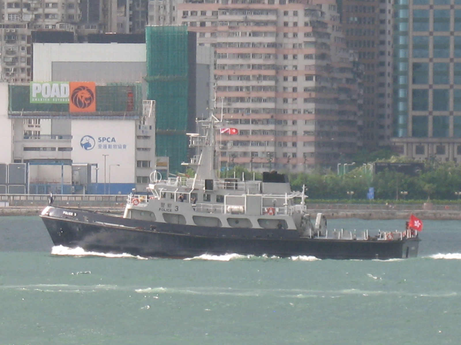 中文（香港）: 這艘三號水警輪，屬於「海豹級」大型指揮輪，此船於1988年下水，船名是「海馬號」，亦是屬於香港警察水警總區的旗艦船隊之一；而三號水警輪在維多利亞港巡邏。